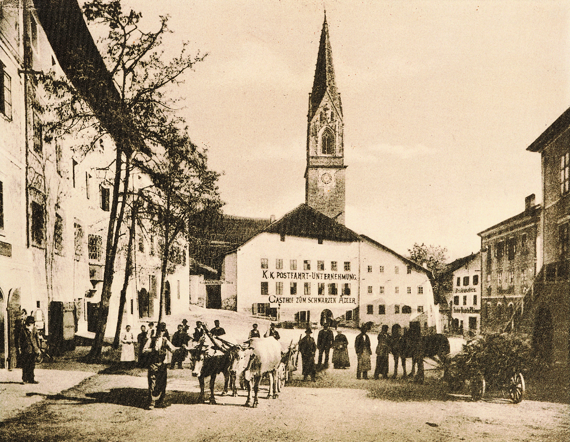 Weingut Josef Hofstätter, im Gasthof zum Schwarzen Adler, Tramin